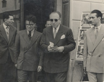 il ministro Ezio Vanoni a Morbegno